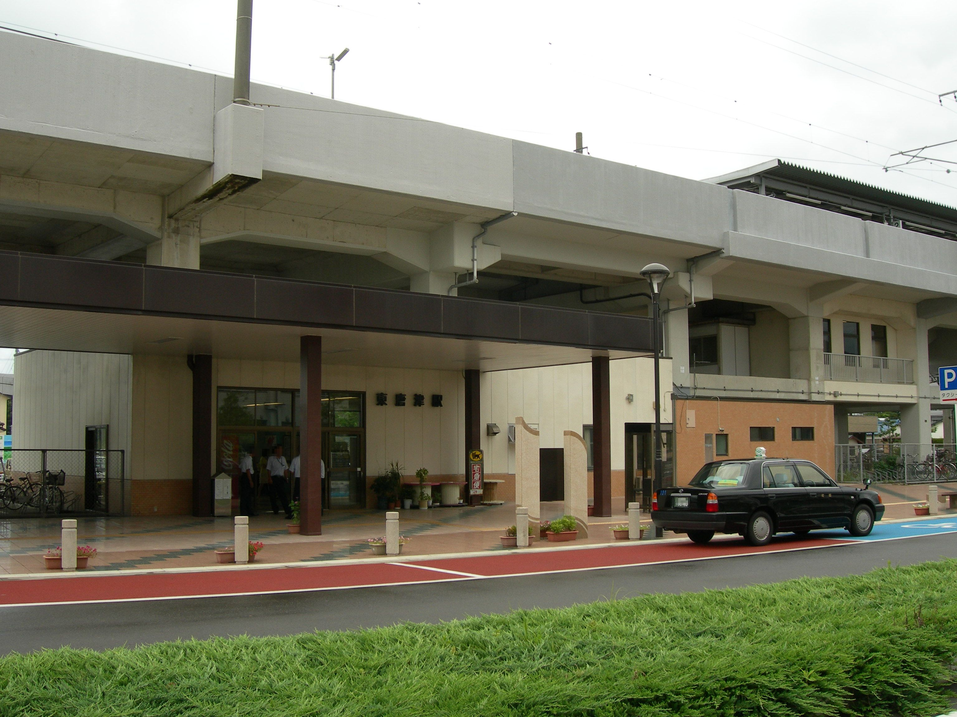 JR九州 東唐津駅南口